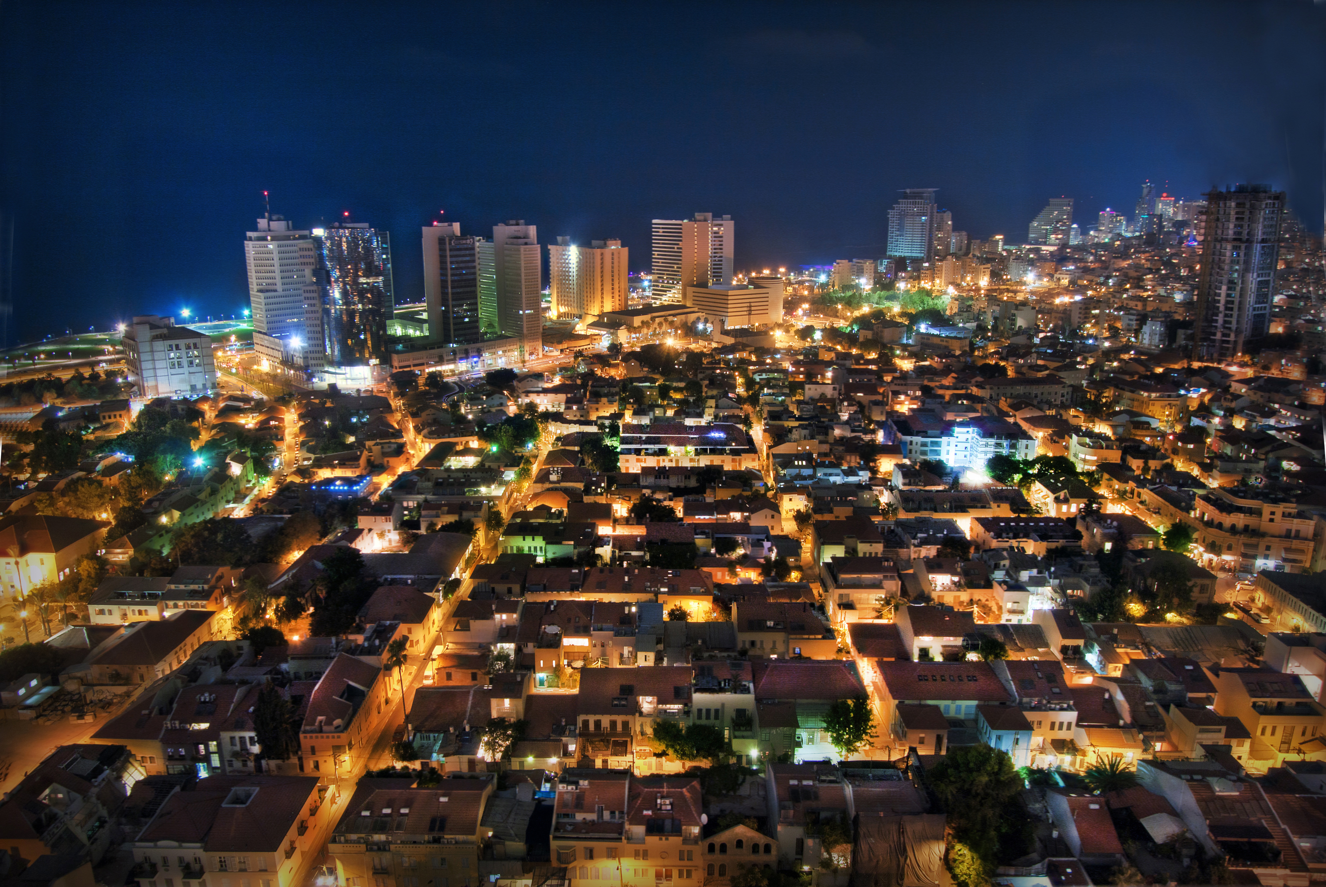 שכונת נווה צדק